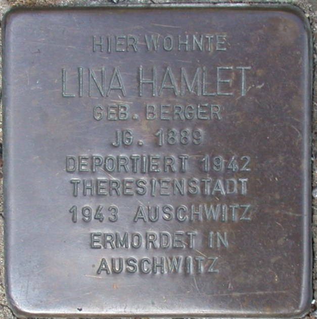 Deutschland - Nordrhein-Westfalen - Kreis Lippe - Bad Salzuflen: Stolperstein zur Erinnerung an Lina Hamlet